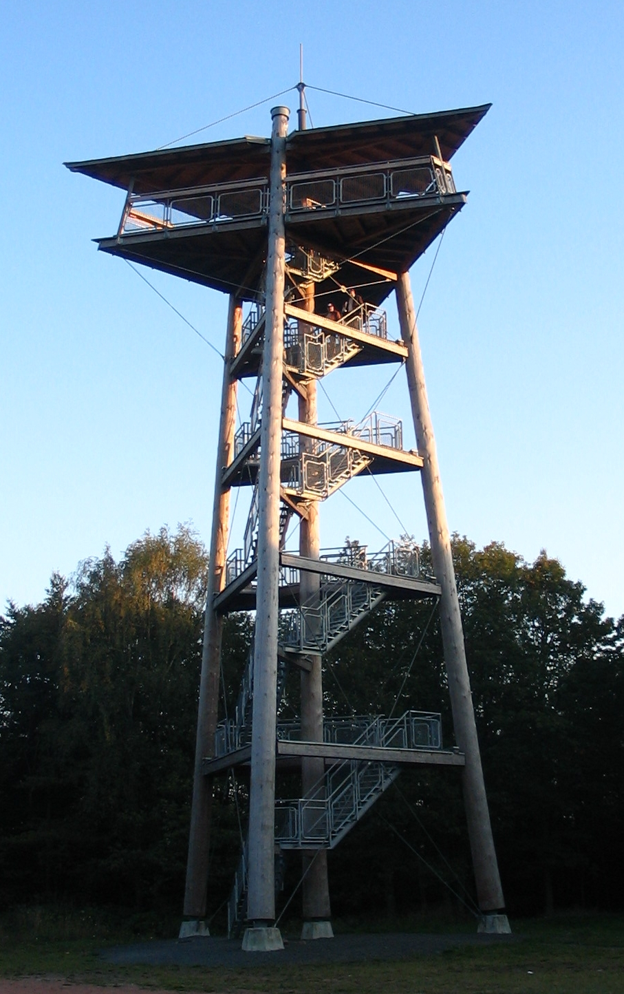 The Hattgenstein tower